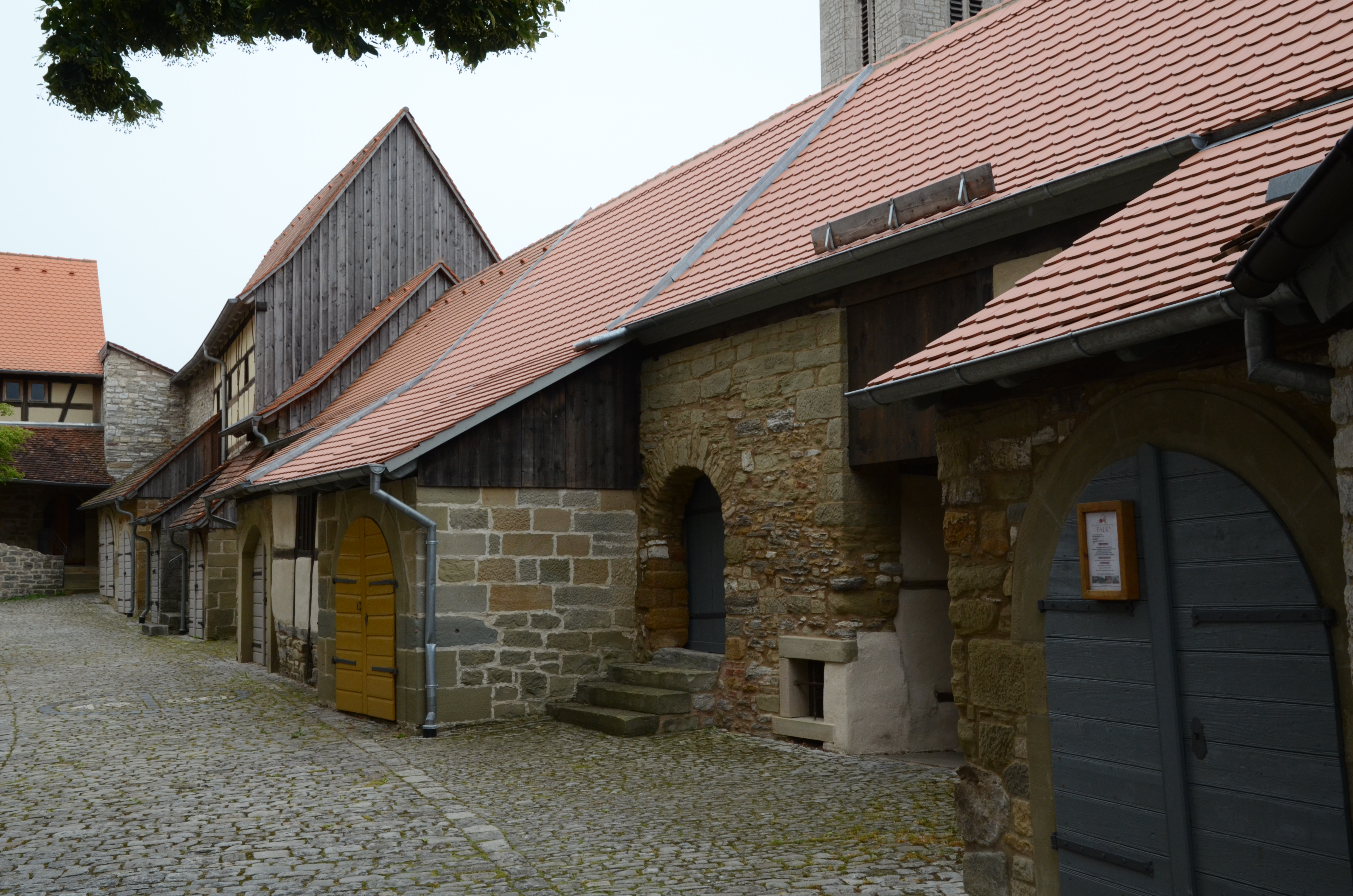 Kirchenburg Hüttenheim